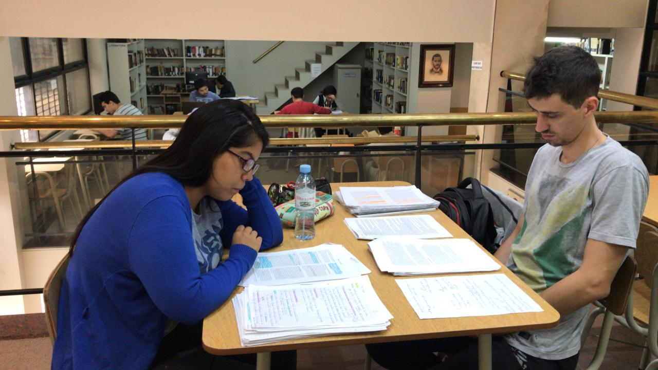 Usuarios estudiando en la sala de lectura